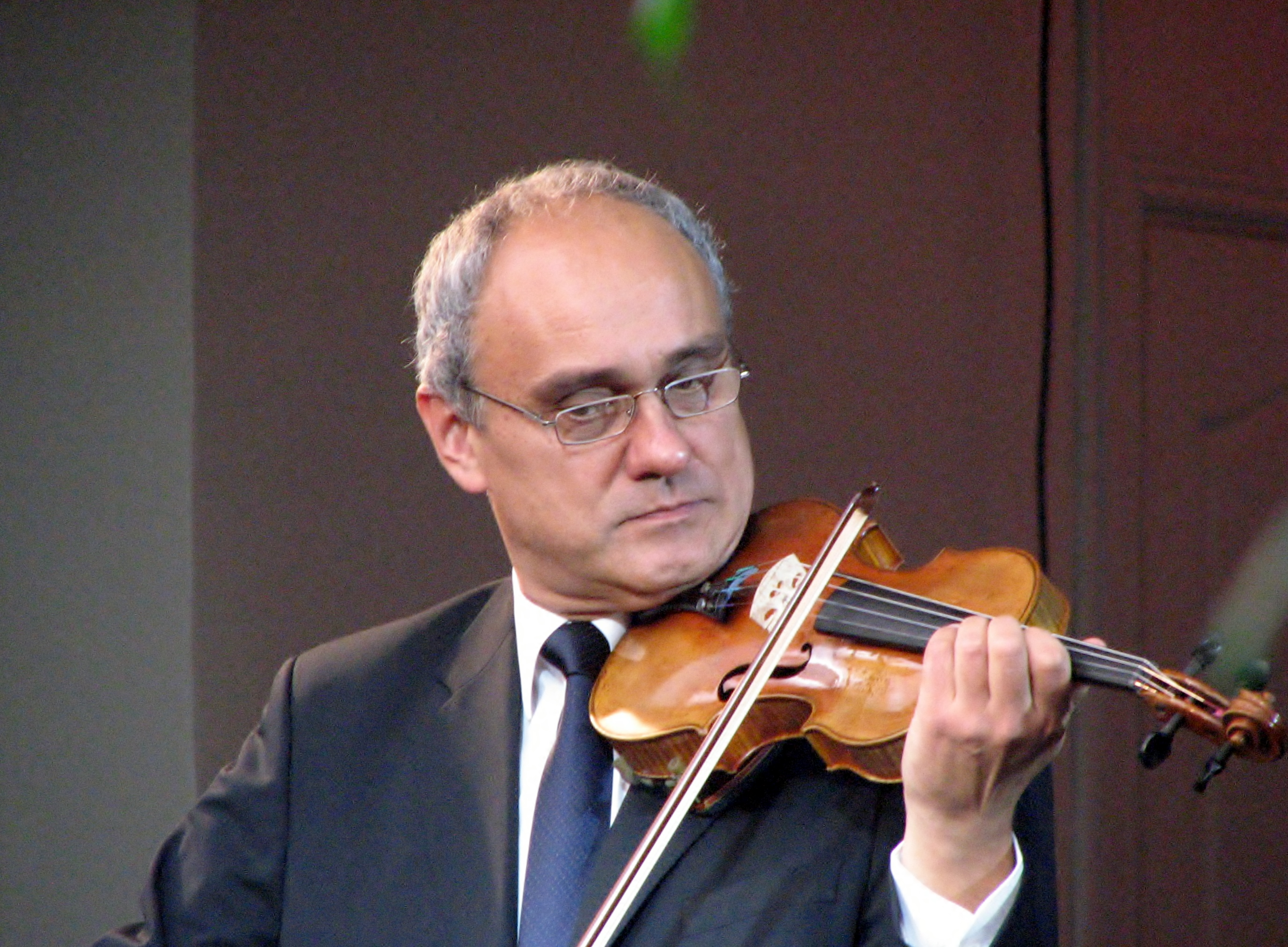 Toomas Nestor Estonia maja 100 postmargi ja Schützi viiuli esitlusel mängimas Schütsi viiulil